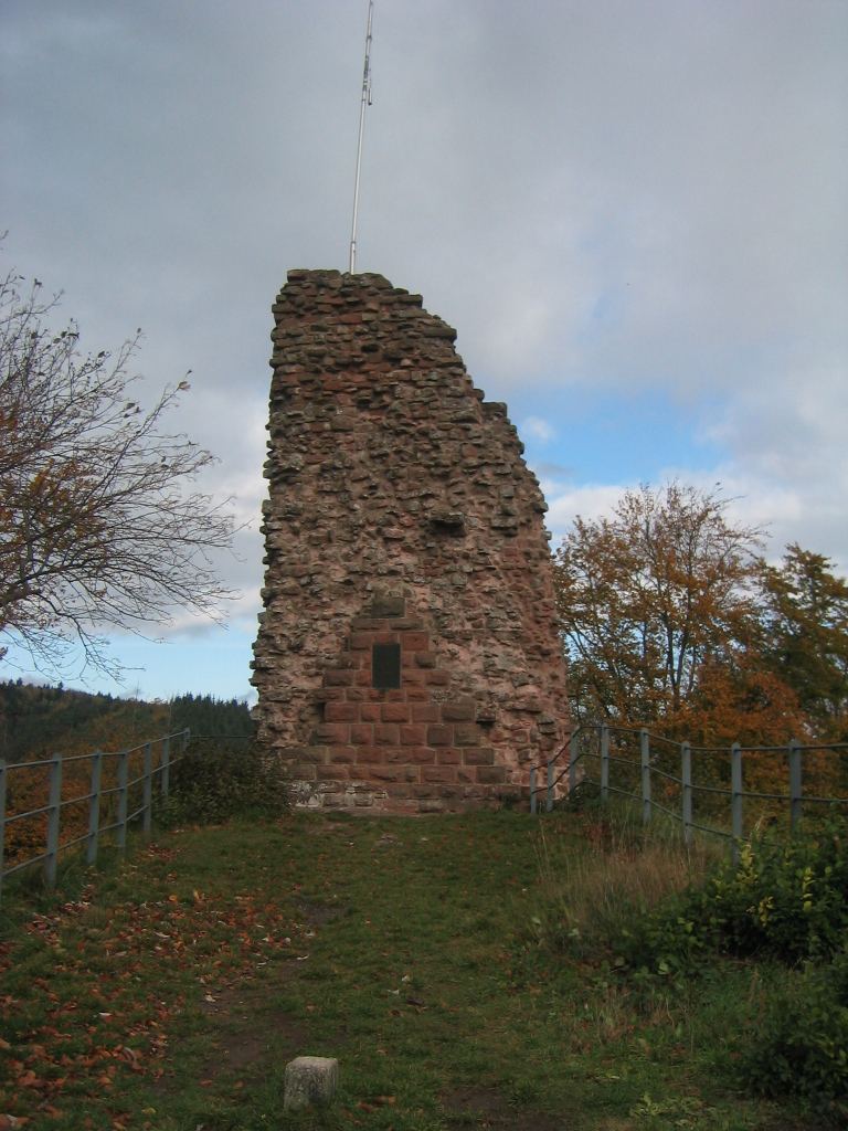 Bergfried der Burg Guttenberg im Pfälzer Wald.